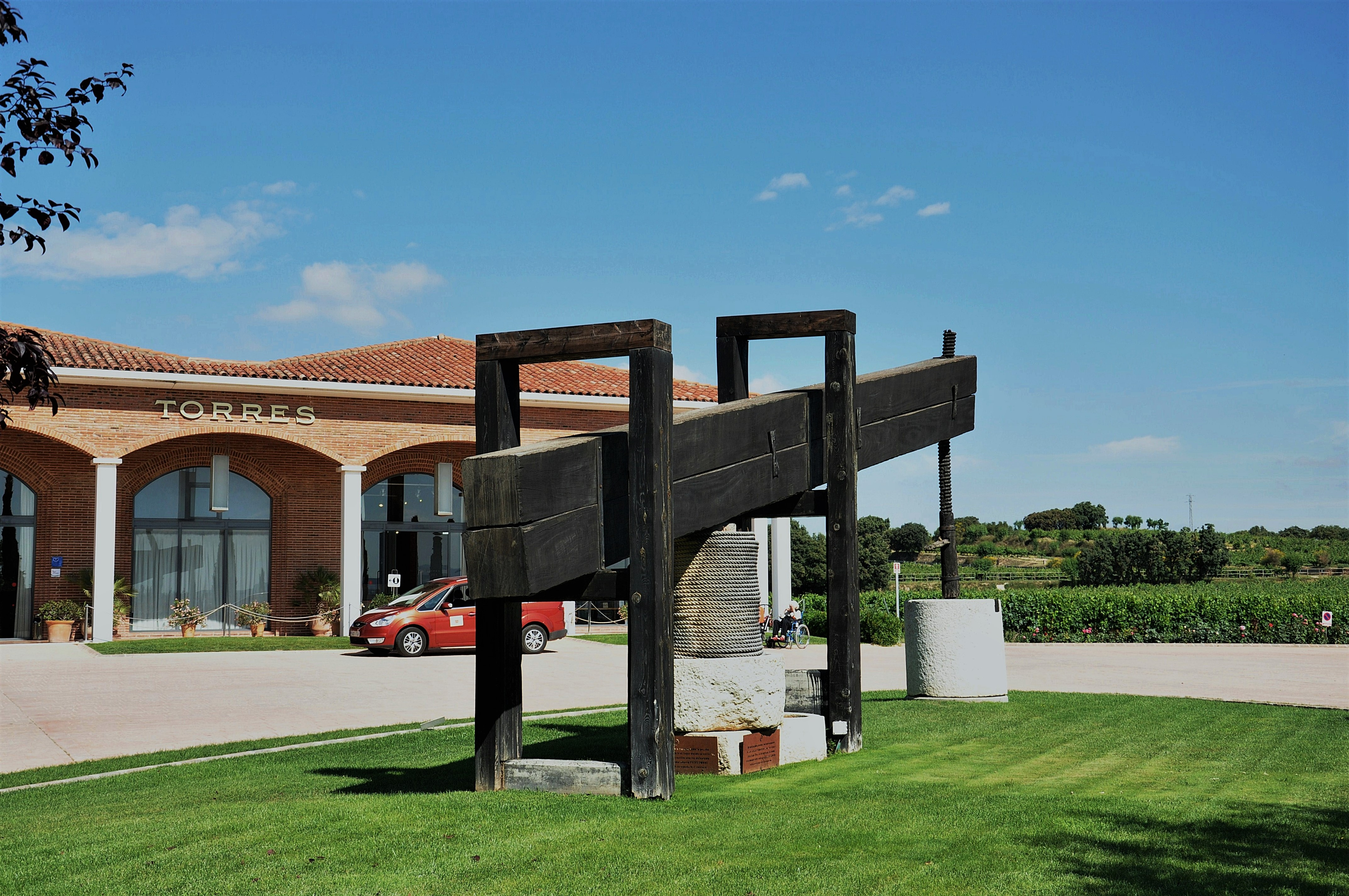 Alt Penedès